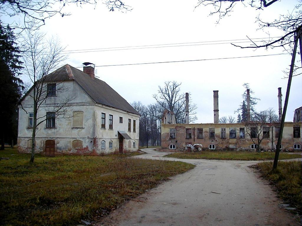 Oleru muiža 2000-11-11